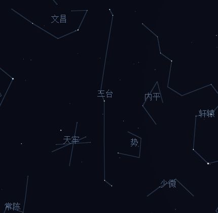 三台 （星官）